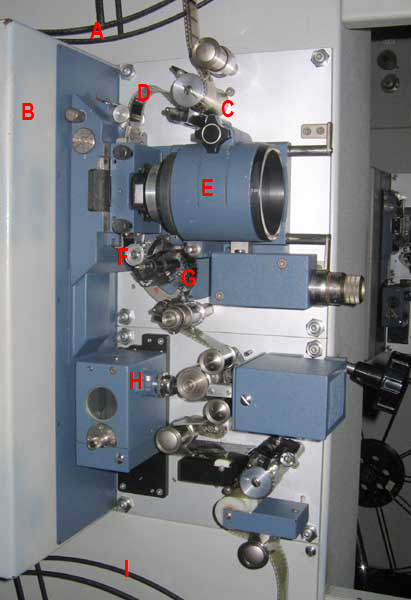 Meo 5 Movie projector mechanism